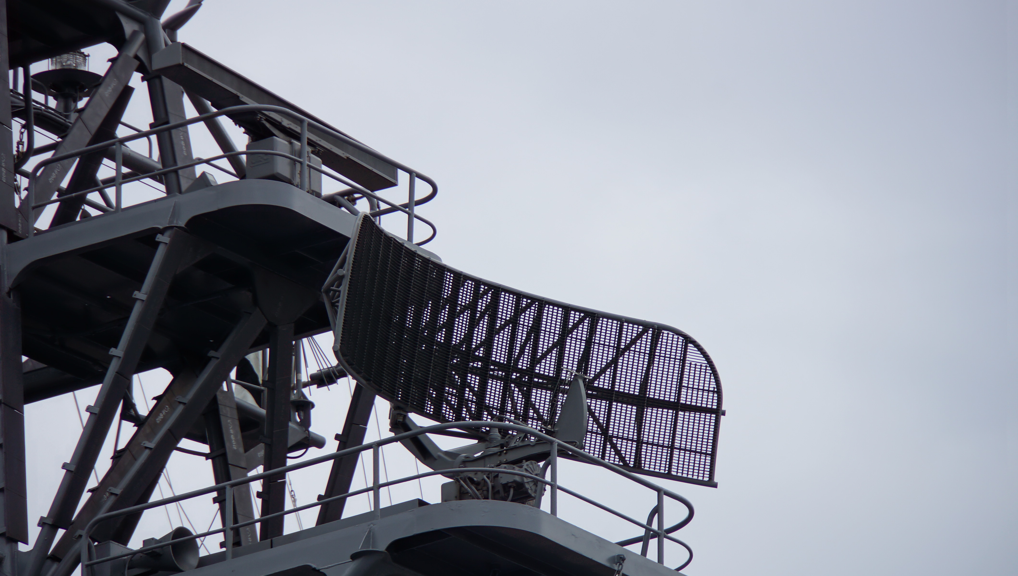 海上自衛隊 音響測定艦はりま（AOS-5202）艦上のOPS-16水上レーダー及びOPS-9航海レーダー。 14年9月15日 呉基地にて。